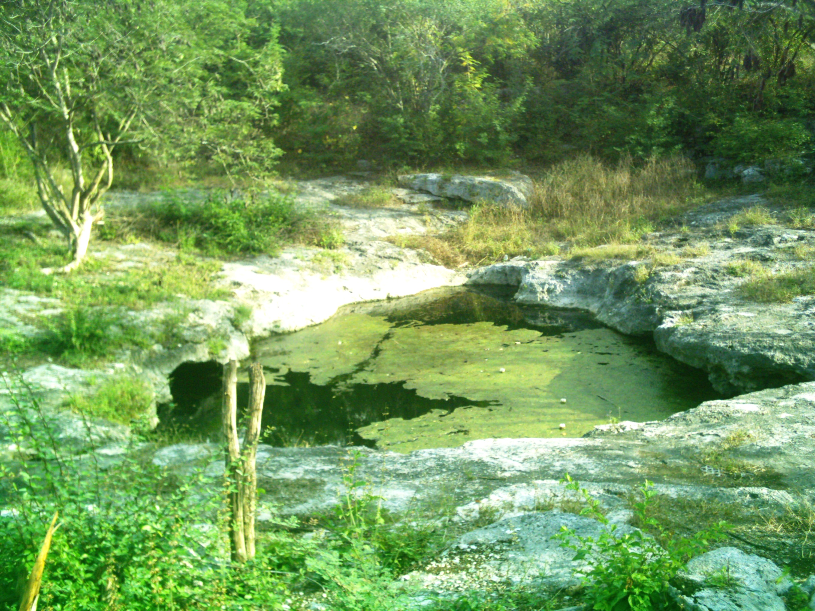 Cenote Chen Ha, carretera Dzityá-Cheumán.